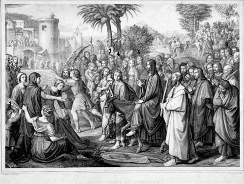 Der Einzug Christi nach Jerusalem mit Legende